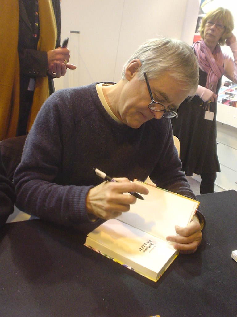 Jacques Jouet au Salon du Livre à Paris en 2010.